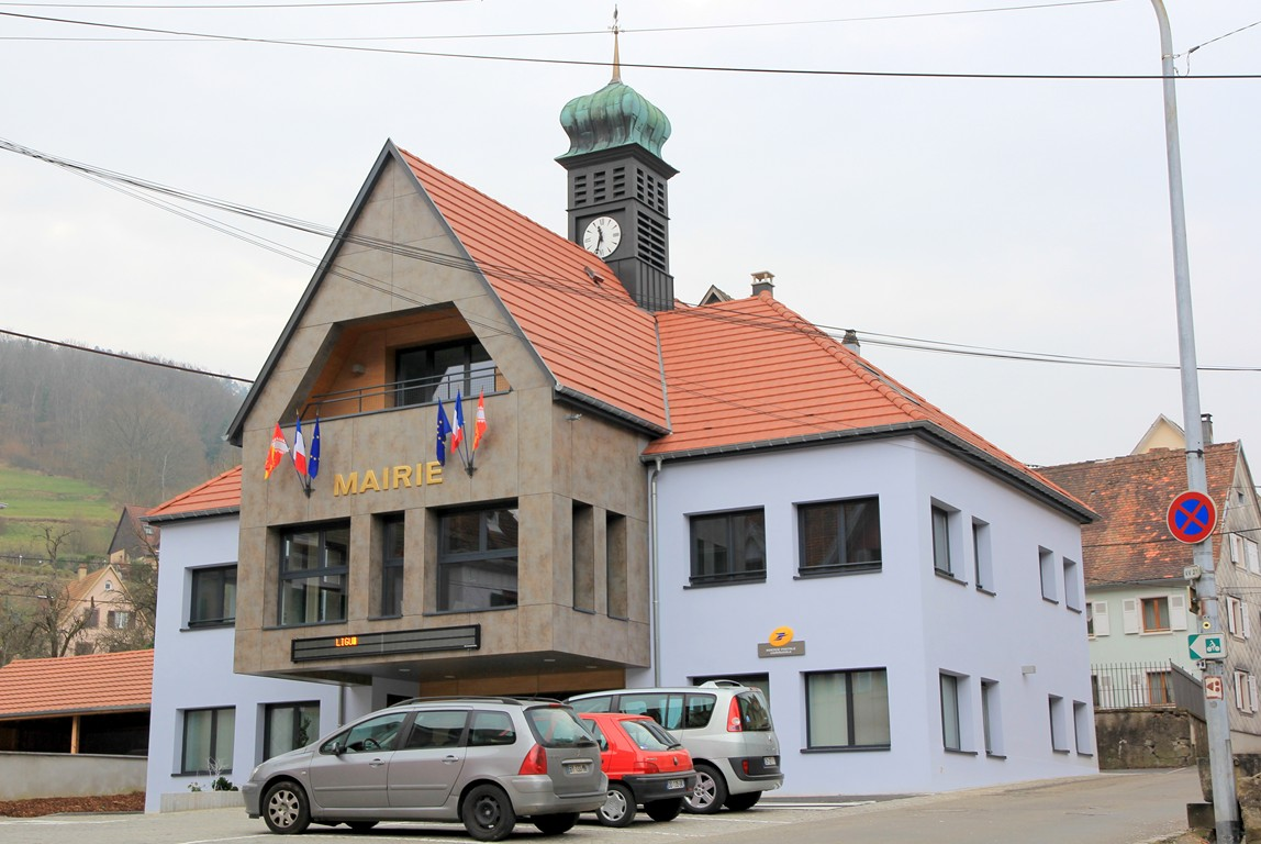 Nouvelle Mairie de Breitenbach